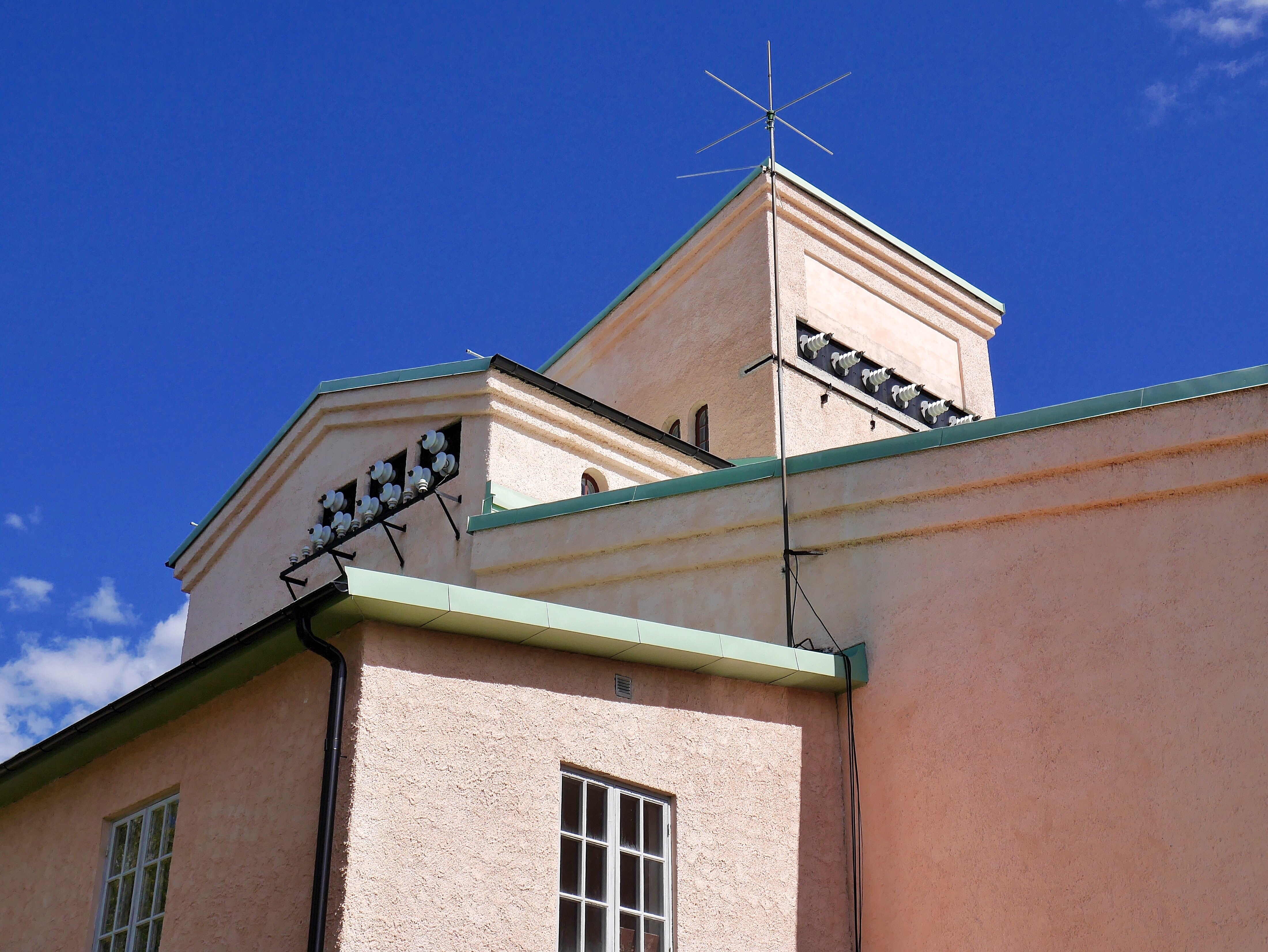 Sikfors gamla kraftstation, uppförd 1911-1912 och belägen efter Piteälven i byn Sikfors, Piteå kommun. Kraftstationen togs ur bruk 1990. Fallhöjden uppgick till 16 meter och effekten till 6MW. Uppförd i byggnadstegel samt för den tiden helt modern armerad betong och med putsad fasad.